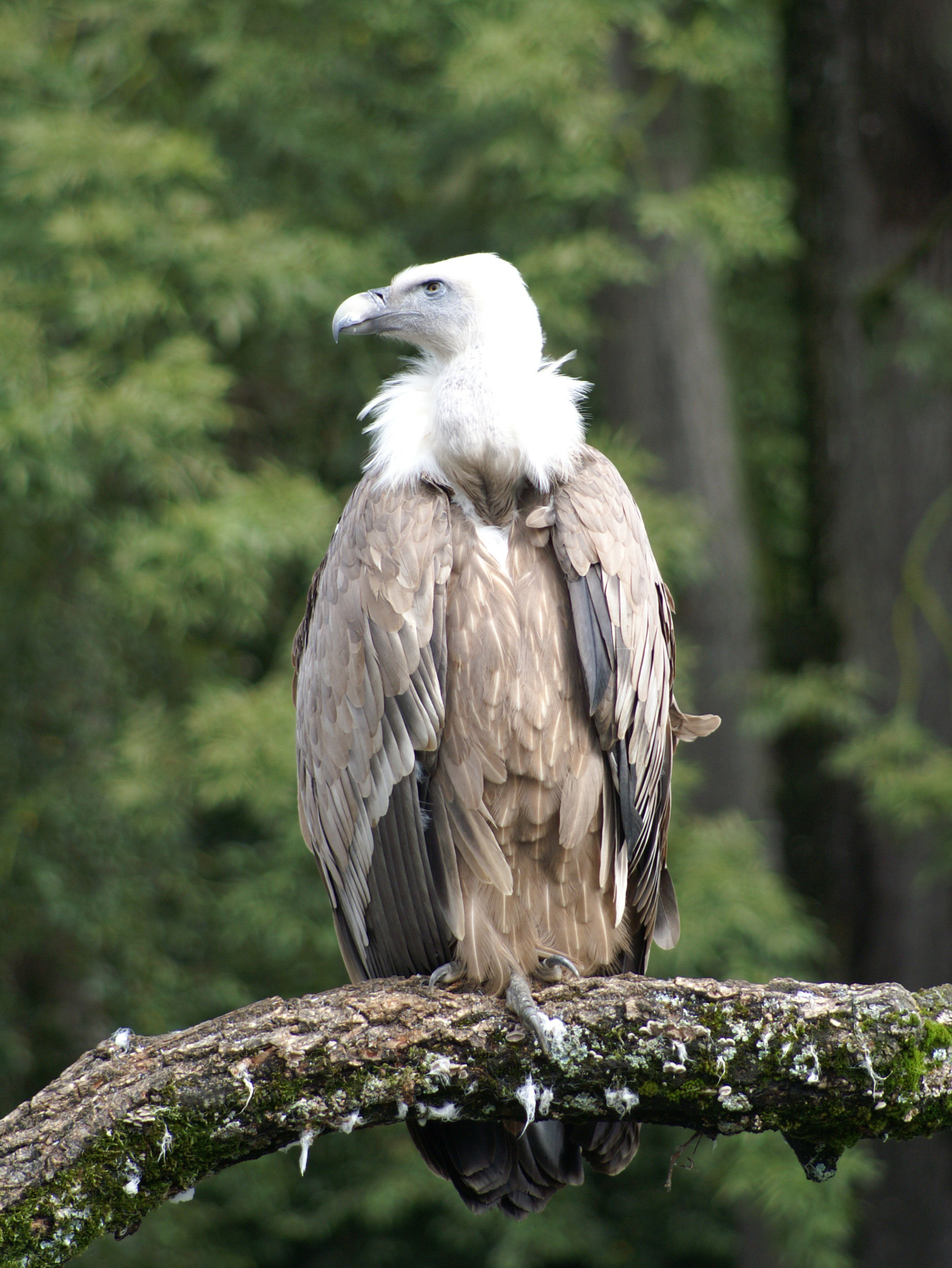 Gänsegeier im Tierpark Bern